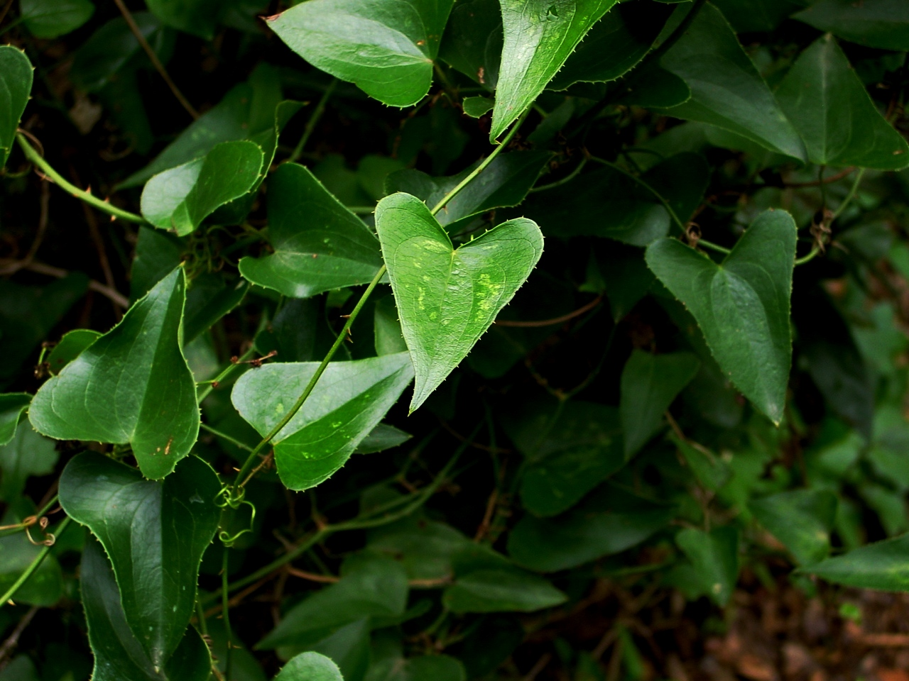 Smilax aspera Riserva naturale Monte Pellegrino Palermo, Sicily